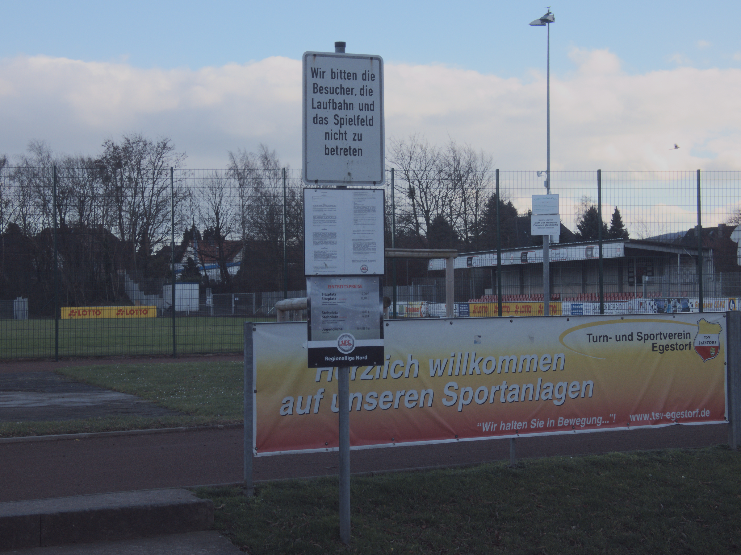 Das Stadion des FC Germania Egestorf/Langreder in Egestorf. Aufgenommen vom Stadiontor an der Ammerke. In Hintergrund rechts die Haupttribüne der "Joyetech-Arena". In Hintergrund links der Zugang zum Gästeblock.